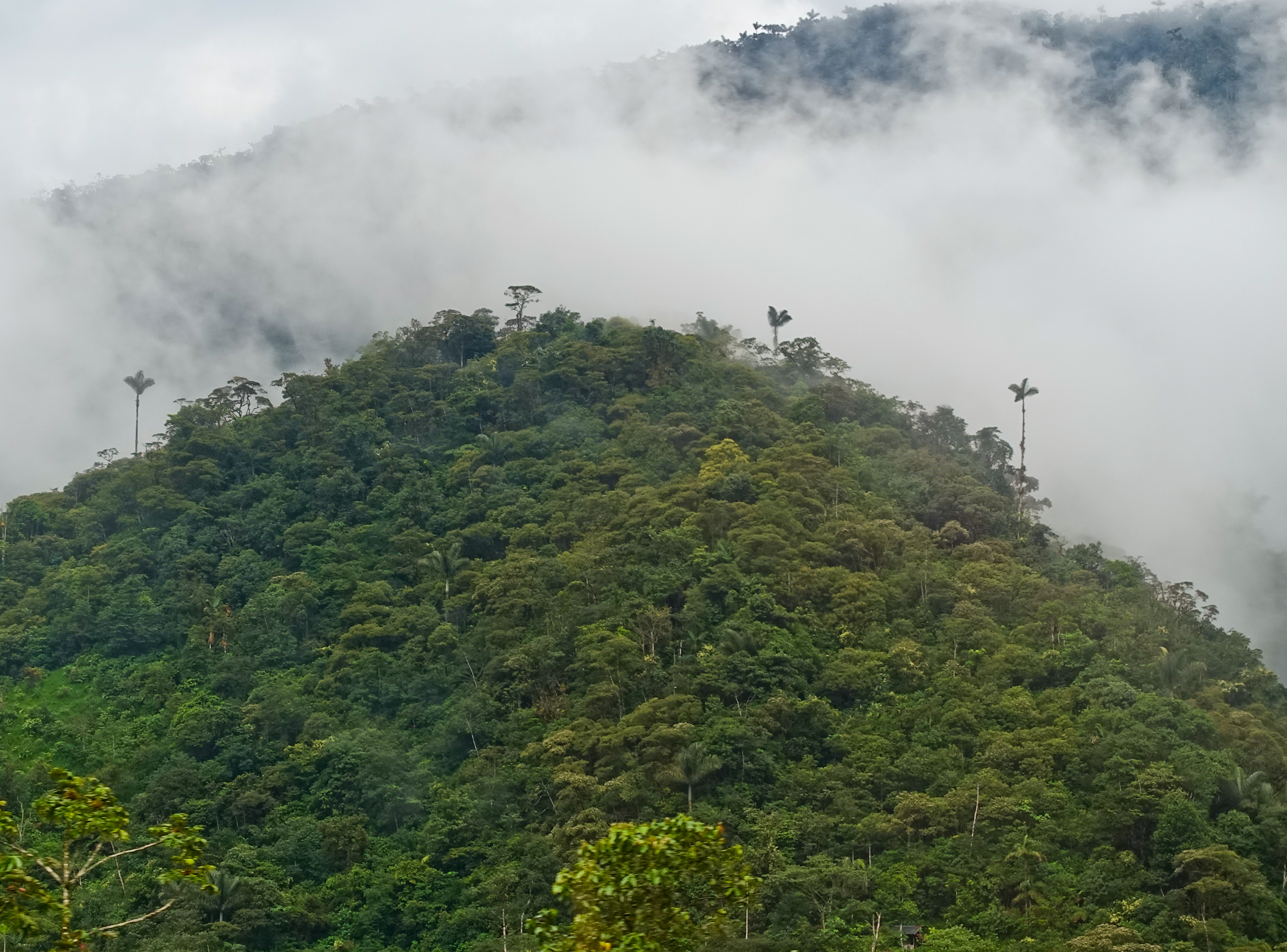 Übergang Bergregenwald zu Wolkenwald, Provinz Tungurahua, Ecuador